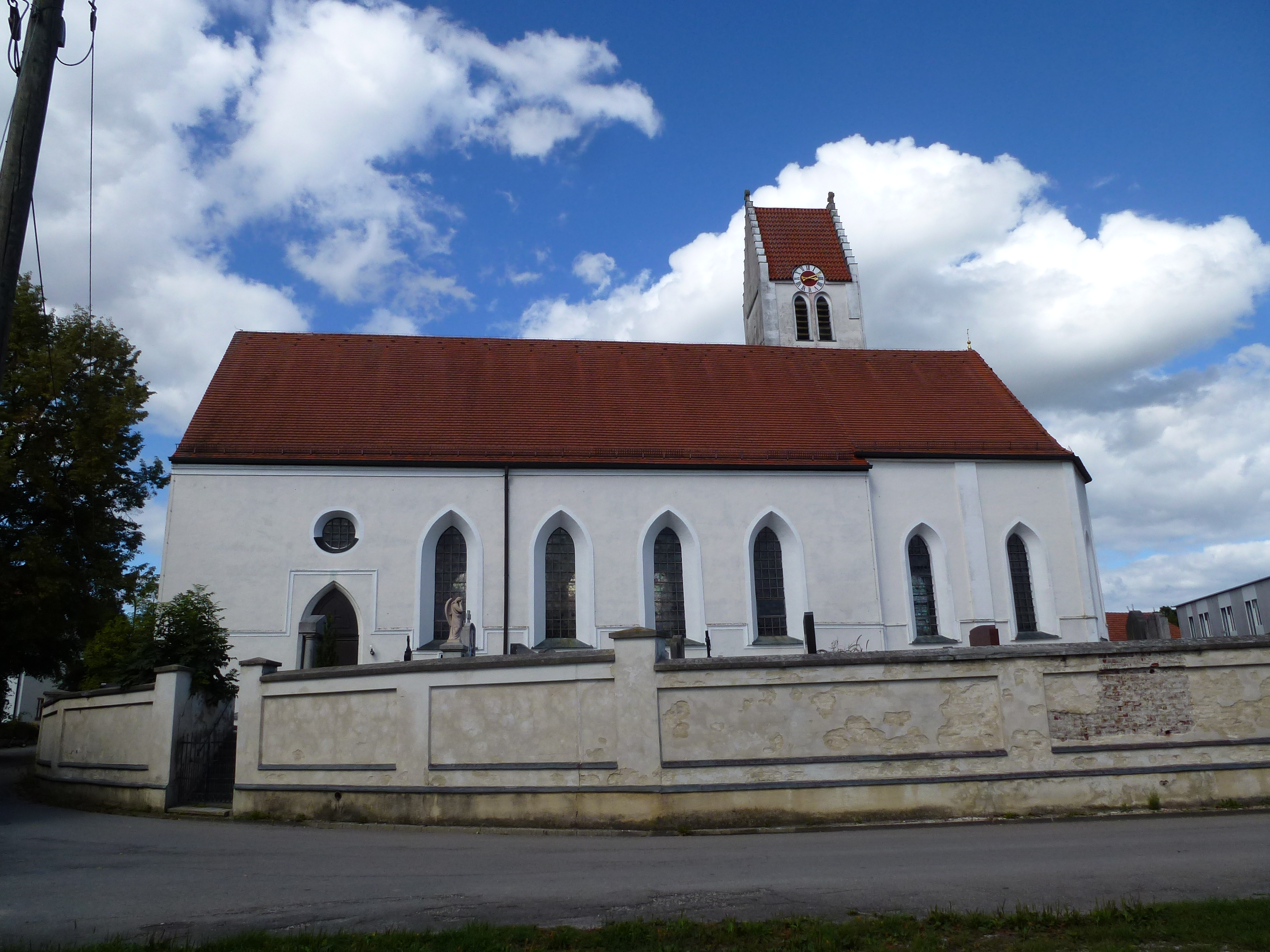 Ampermoching, Kirchenstr.2: Katholische Pfarrkirche St. Peter. Ansicht von SSW